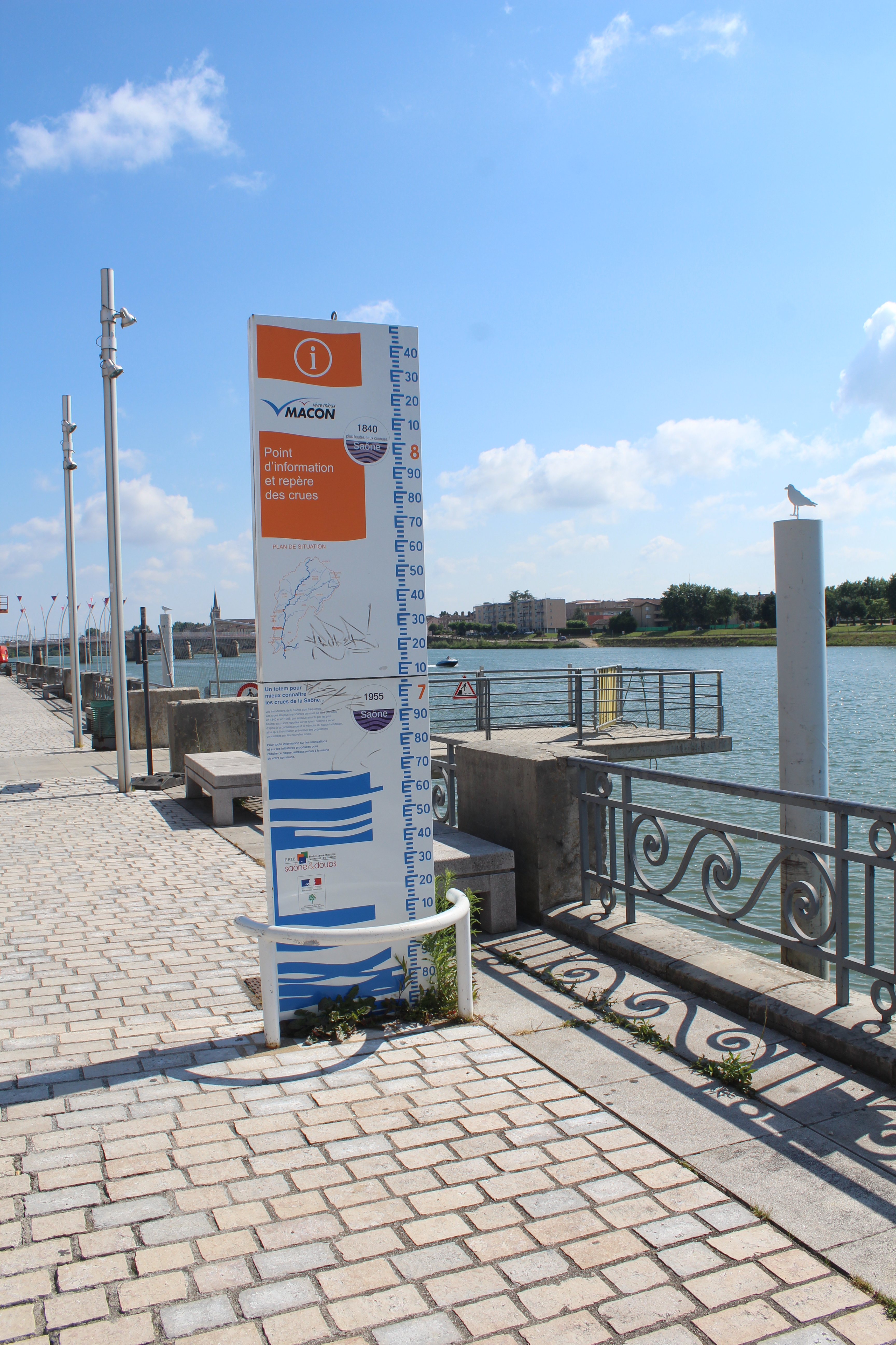 Panneau d'information des crues de la Saône à Mâcon.